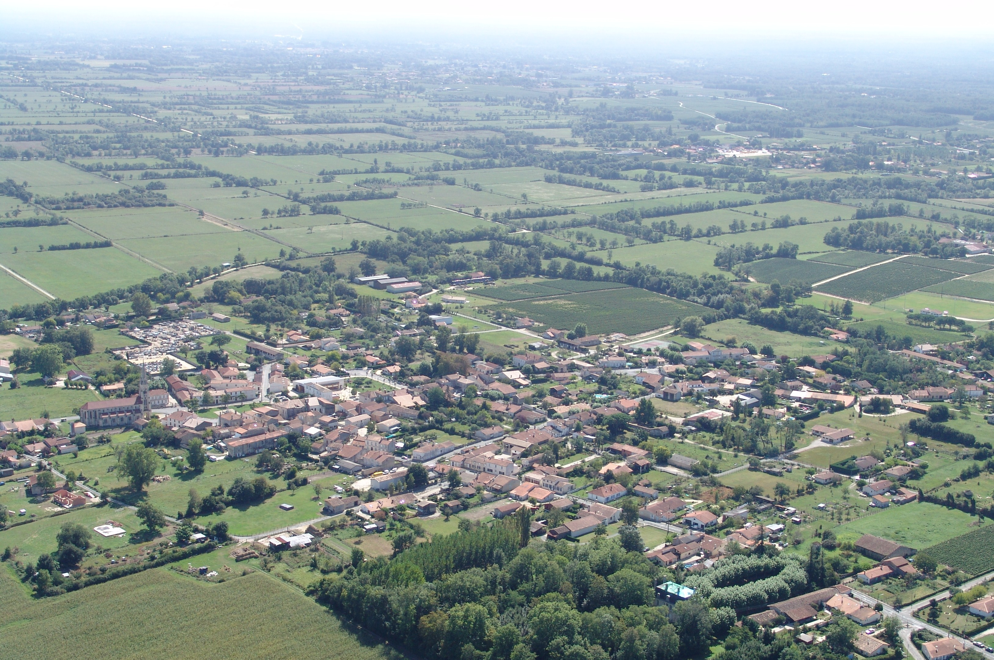 queyrac